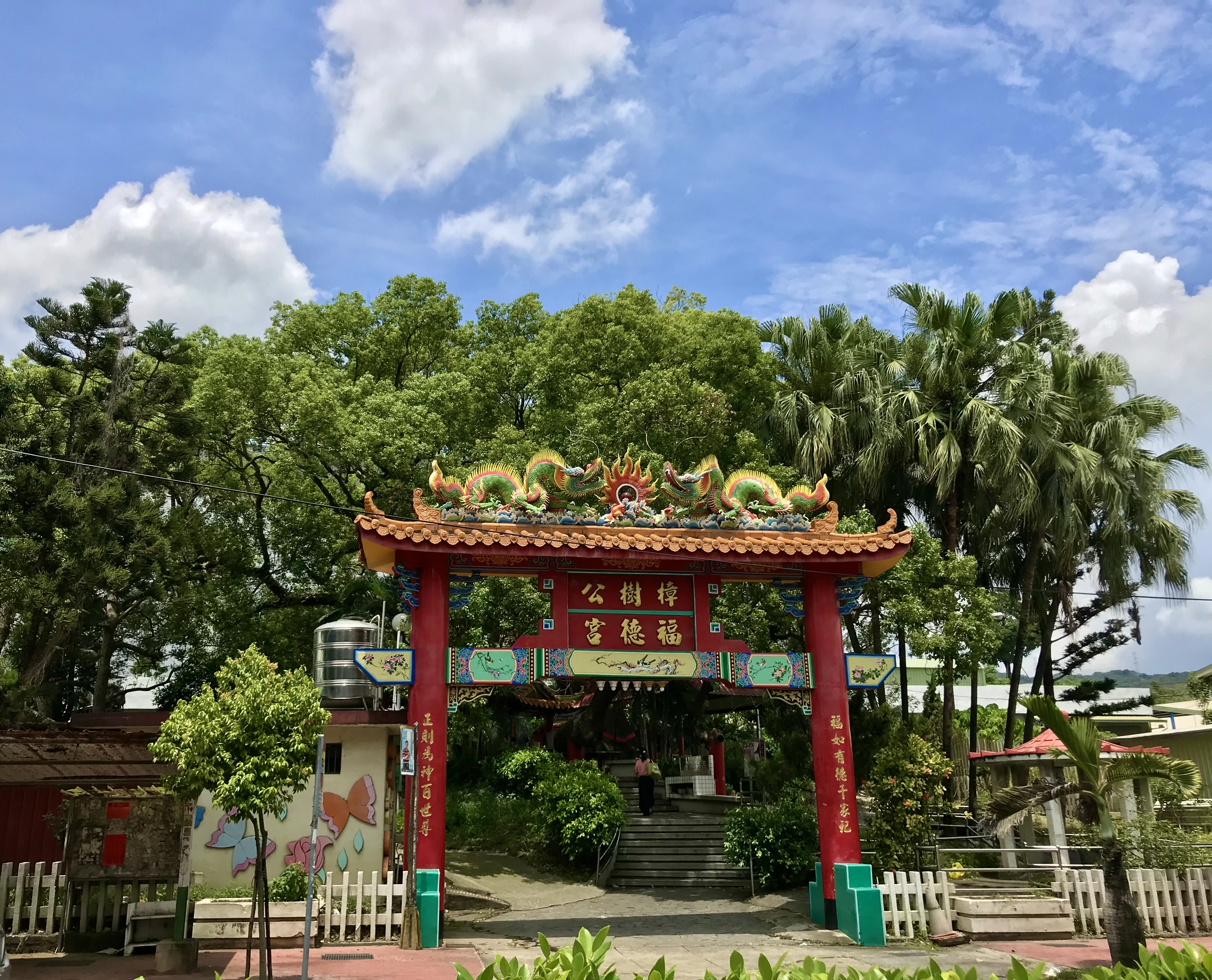 中文（台灣）: 南投市樟樹園